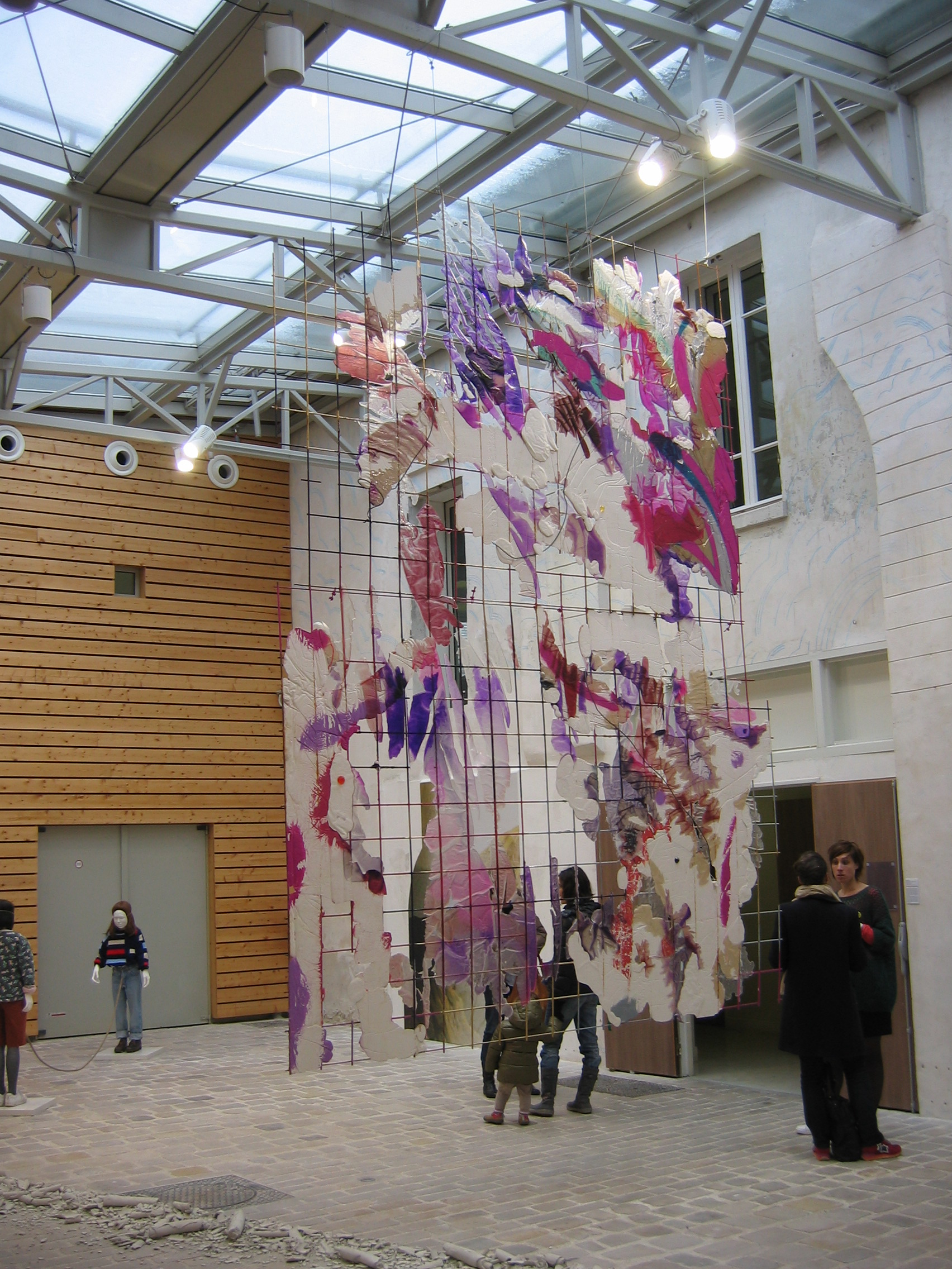 Cour intérieure de la graineterie, ancien immeuble de la ville d'Houilles restauré dans les années 2010 pour en faire un centre culturel